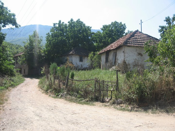 Srpski (latinica): Veta selo, Opština Bela Palanka, Srbija